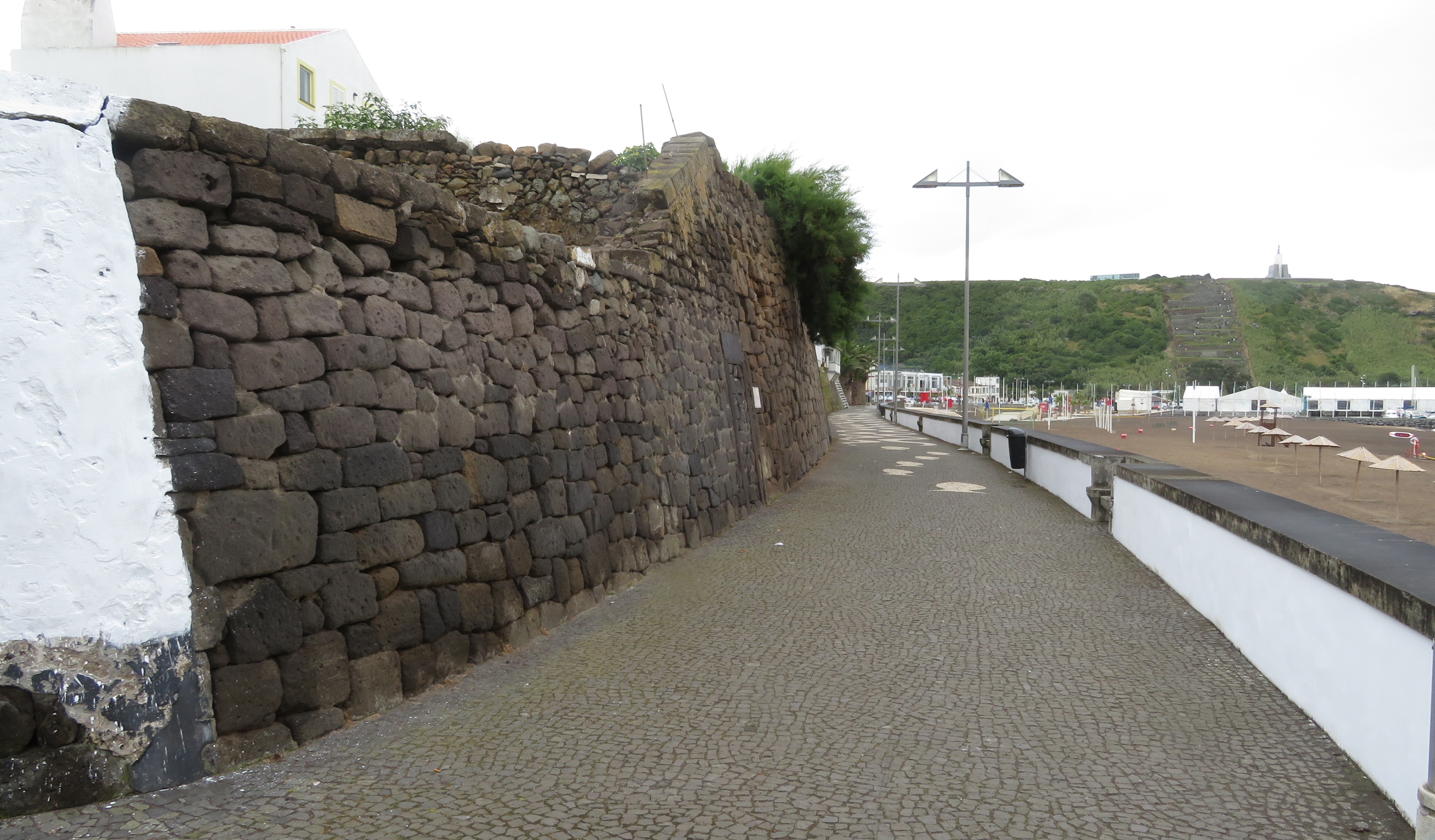 Alte Stadtmauer, Praia da Vitória, Insel Terceira, Azoren, Portugal